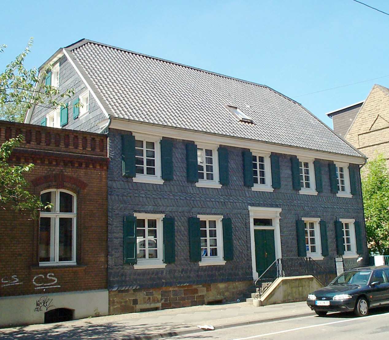 Ehemalige Adler-Apotheke in Leverkusen-Opladen, jetzt ein Wohnhaus